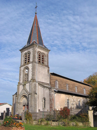 Eglise Saint-André